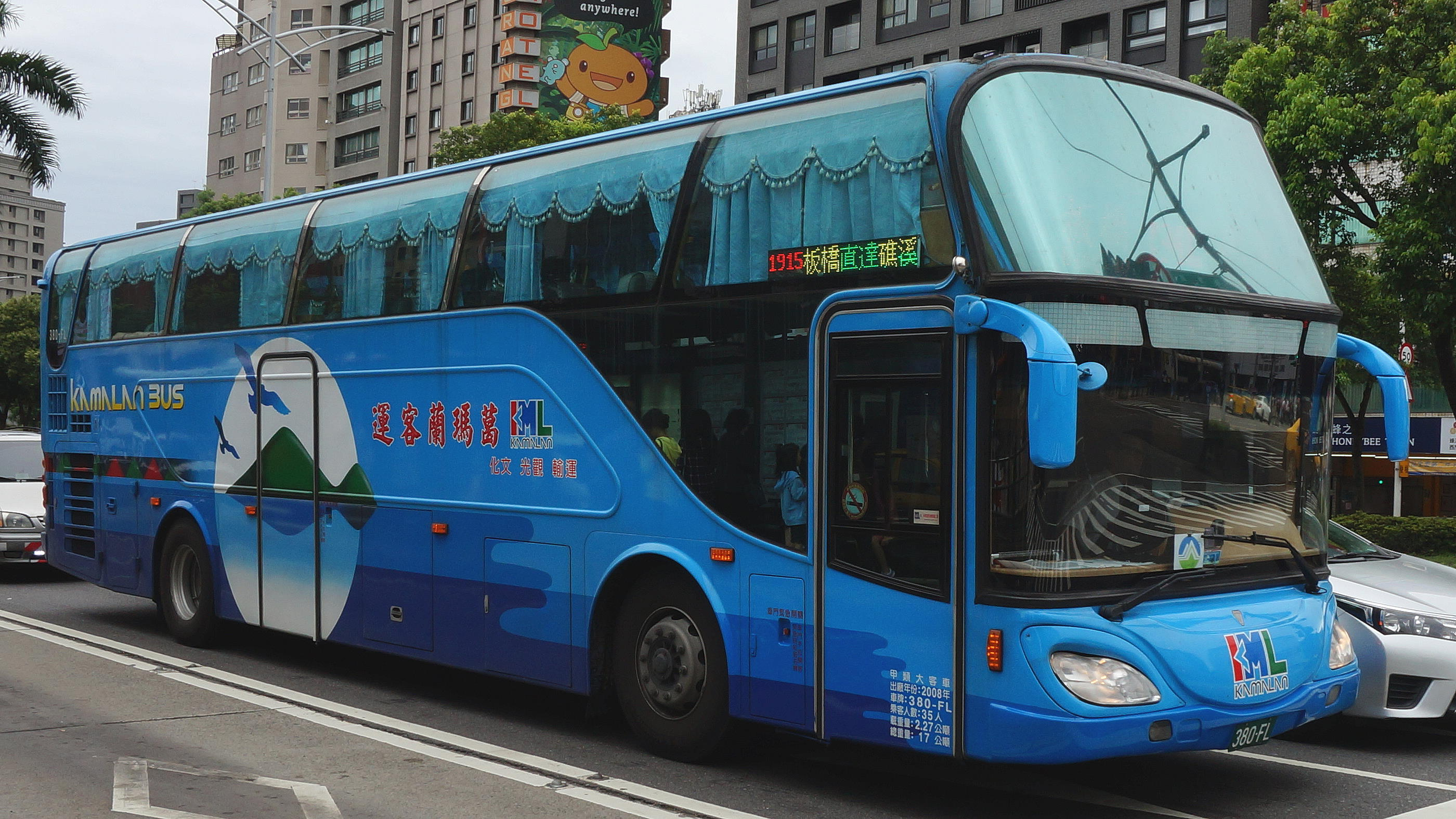 葛瑪蘭客運2008年三菱扶桑RP51JP3L大客車380-FL，行駛1915線。